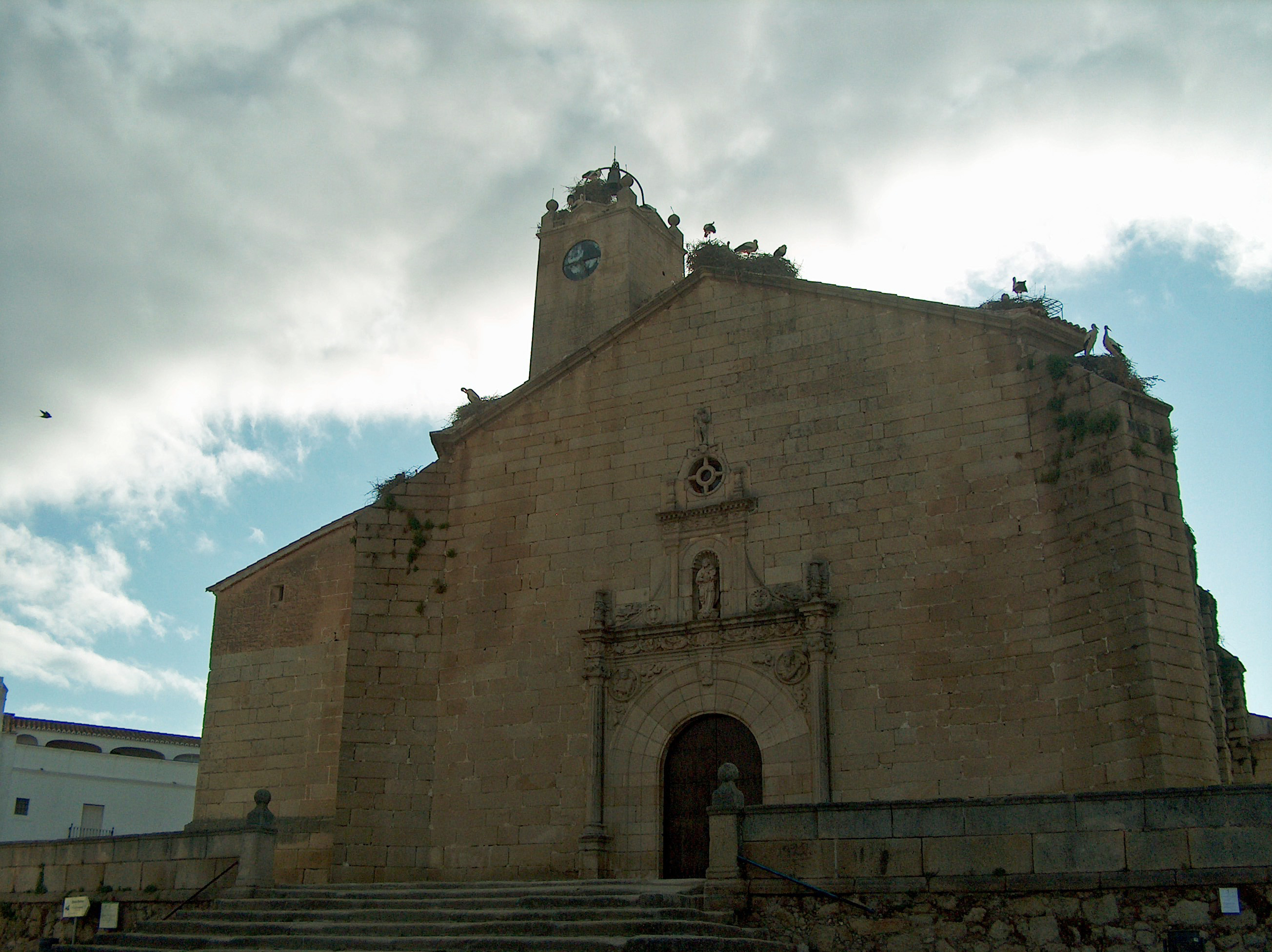 La Iglesia parroquial de Malpartida de Cáceres